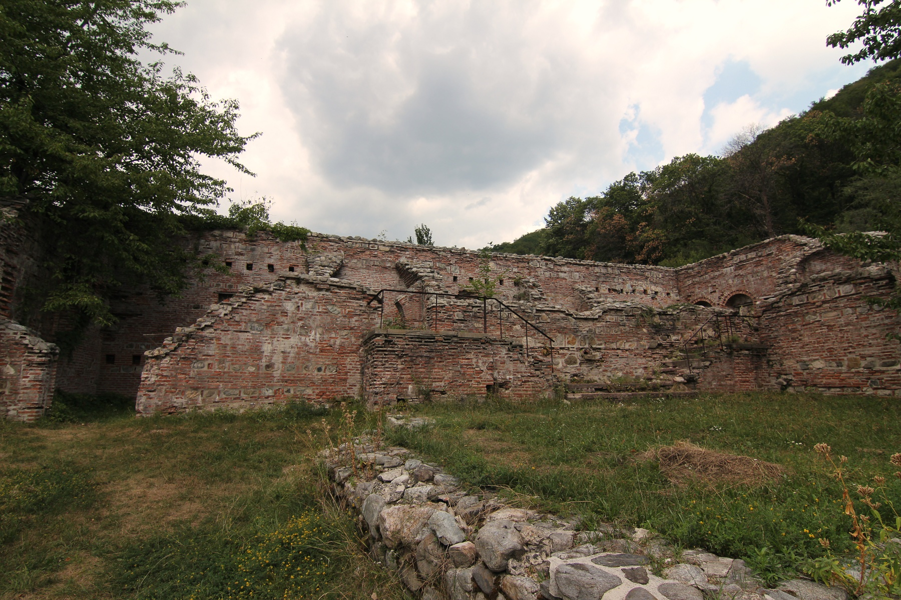 Hurezi, Ruine Bolniță 02